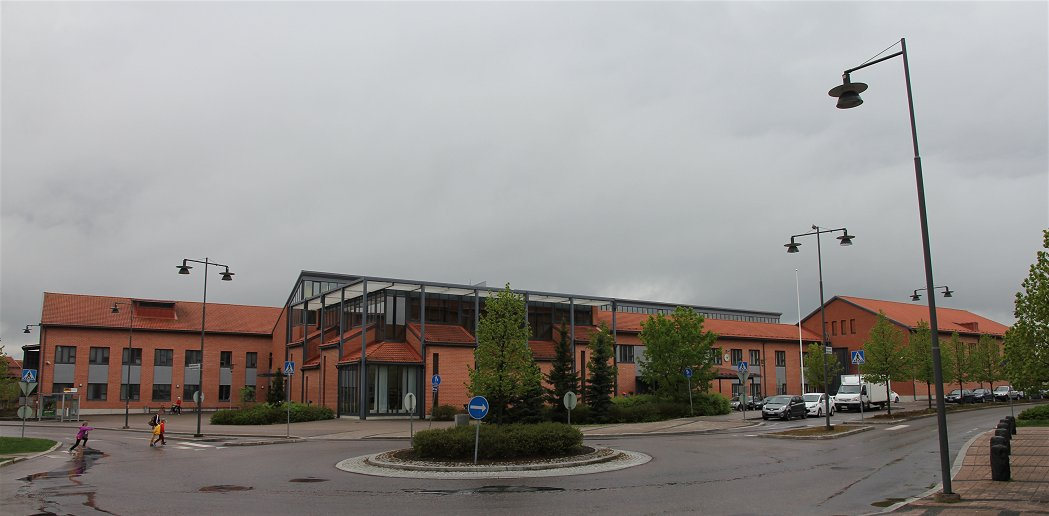 Point eli Pakkalan oppimis- ja informaatiotalo Vantaan Pakkalan kaupunginosassa. Rakennuksessa toimivat muun muassa Vantaan kansainvälinen koulu, päiväkoti ja Vantaan kaupunginkirjaston Pointin kirjasto.